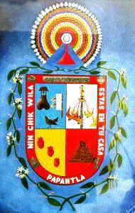 escudo de papantla